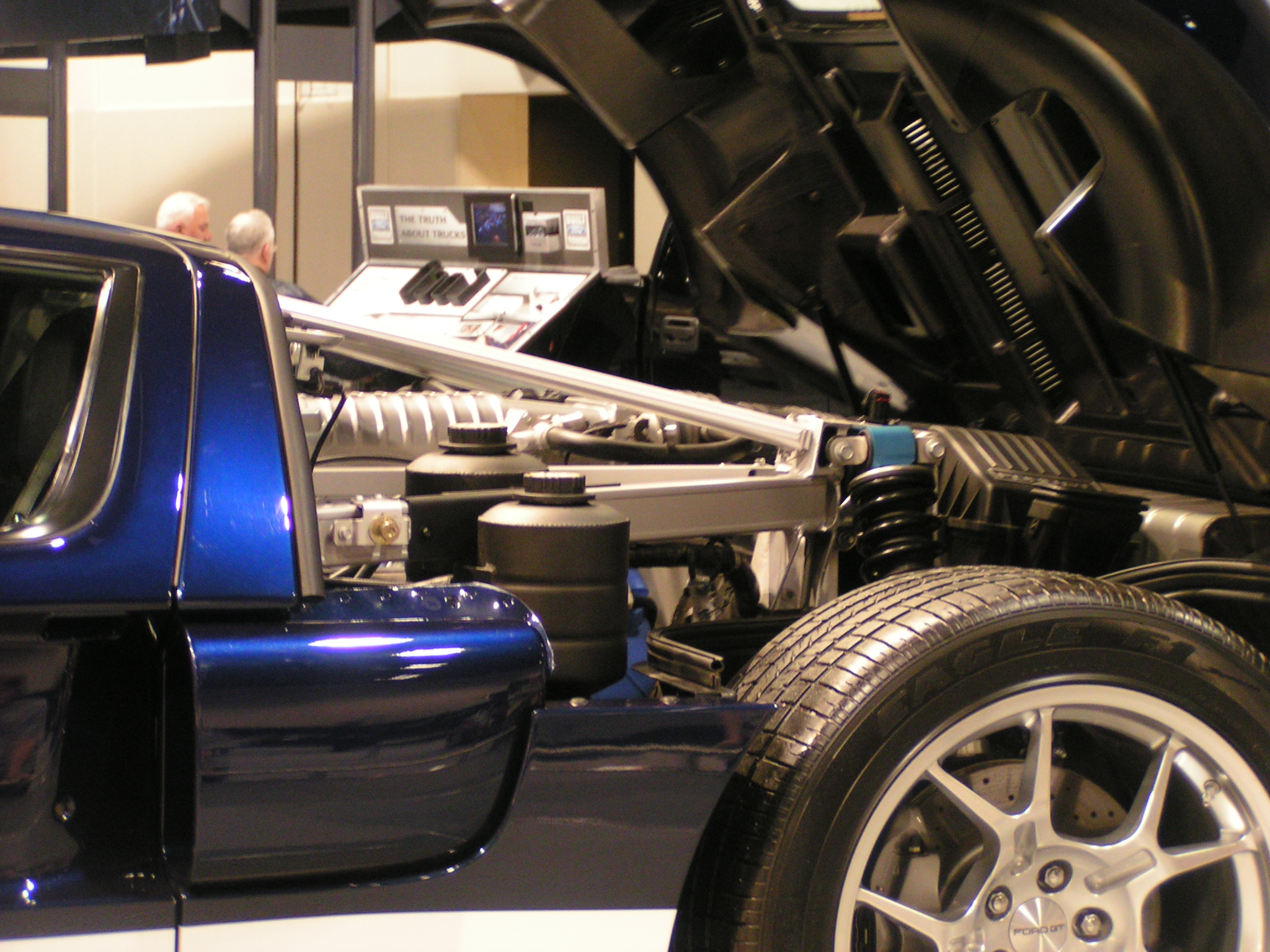 2005 Ford GT engine